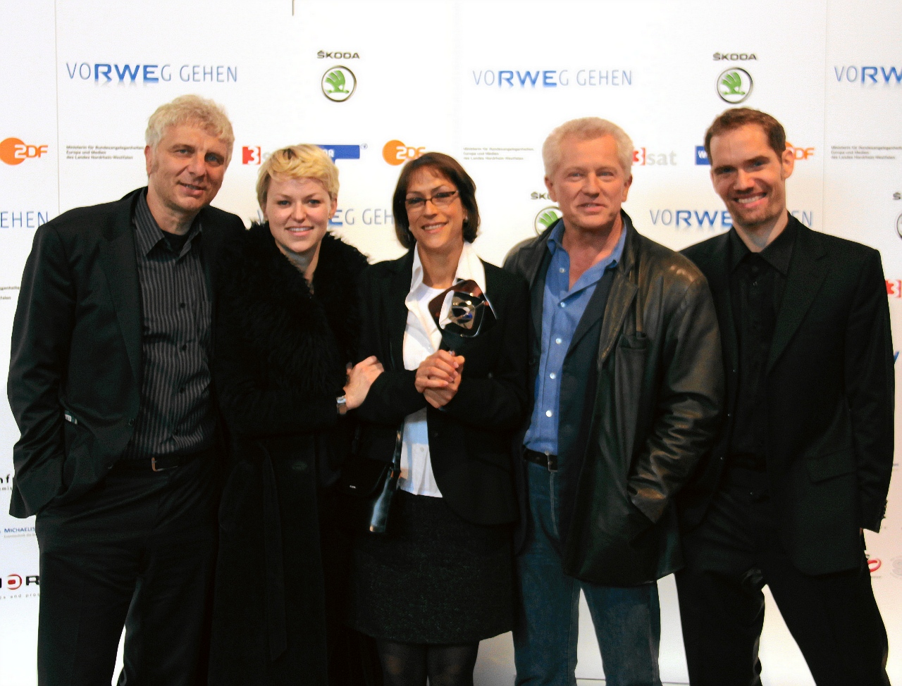 Tatort München-Team, Grimme-Preisträger 2011 für die Episode Nie wieder frei sein: Udo Wachtveitl, Lisa Wagner, Dinah Marte Golch, Miroslav Nemec und Christian Zübert